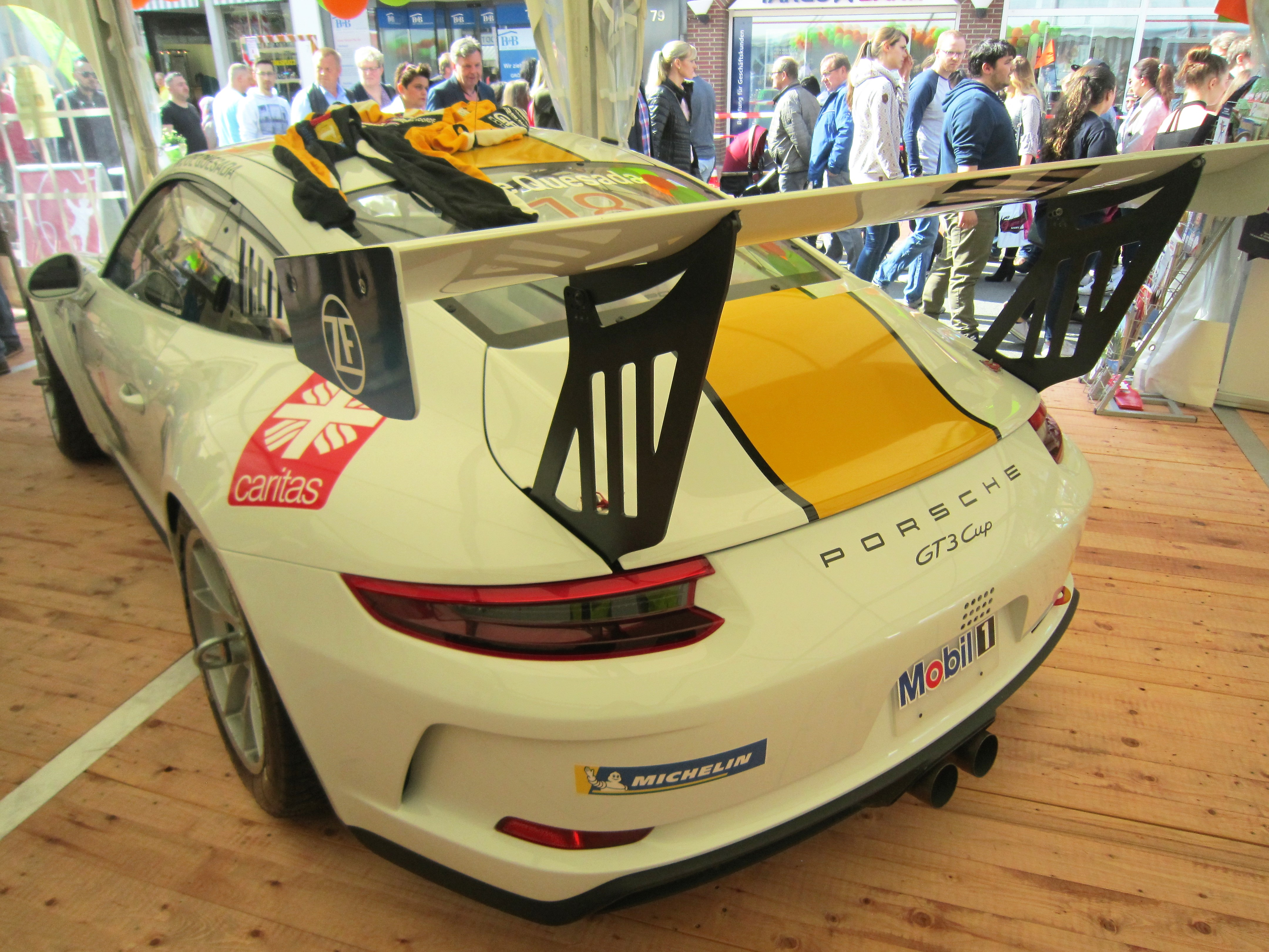 Eyecatcher mit Caritas-Werbung auf einem Infostand für Selbsthilfegruppen anlässlich der Aktion Frühinklisive auf dem Frühlingsfest Vechta 2018